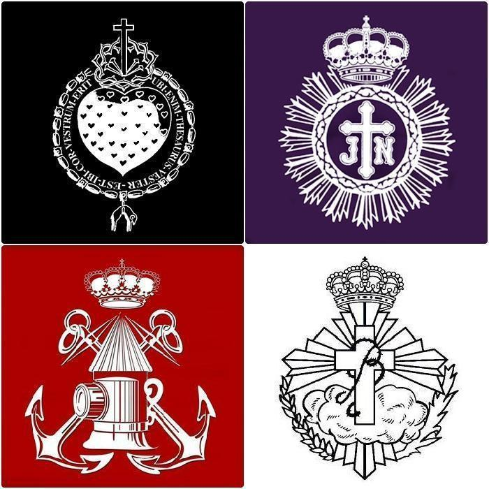 (negro) Cofradía del Socorro (morado) Cofradía Marraja (encarnado) Cofradía California (blanco) Cofradía del Resucitado